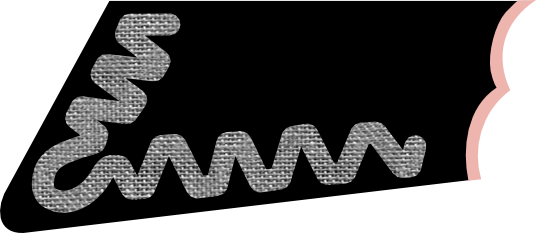 Łapka saperów na kołnierz kurtki - II RP